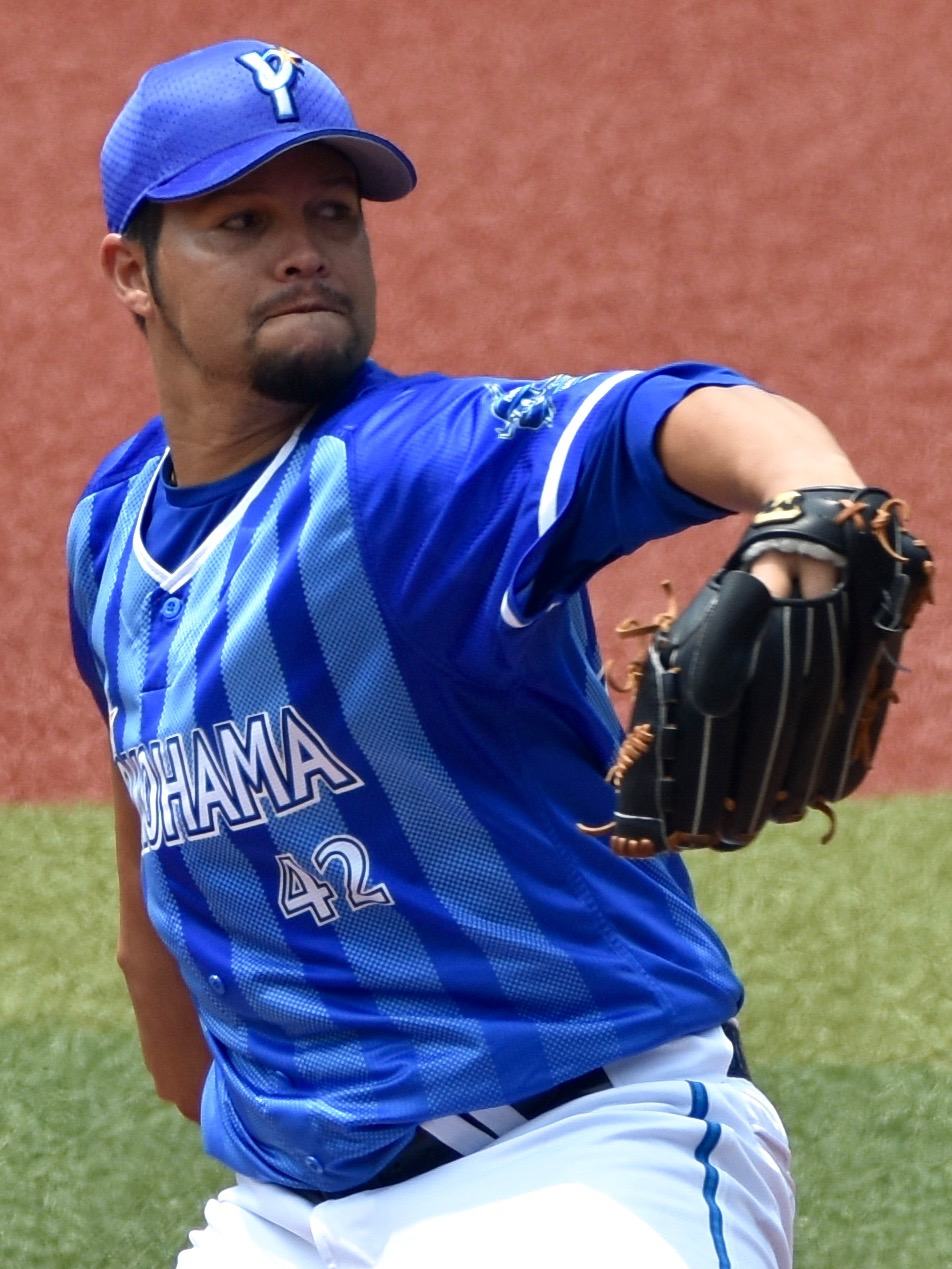 2018年5月18日、ZOZOマリンスタジアムにて撮影